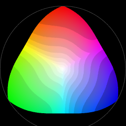 Bovenaanzicht van een aantal doorsneden van de kleurruimte die door het mengen van rood, groen en blauw (zoals in een RGB-monitor) tot stand komt. De verzadiging loopt op van het centrum naar de cirkelrand. De rand zelf wordt alleen bereikt met de basiskleuren; de mengkleuren hebben een geringere verzadiging. Het plaatje is gegenereerd met een zelfgeschreven C-programma. Auteursrechtenvrij gepubliceerd.